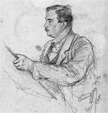 Christian Wilhelm Allers (1857-1915), Selbstportrait (1894).